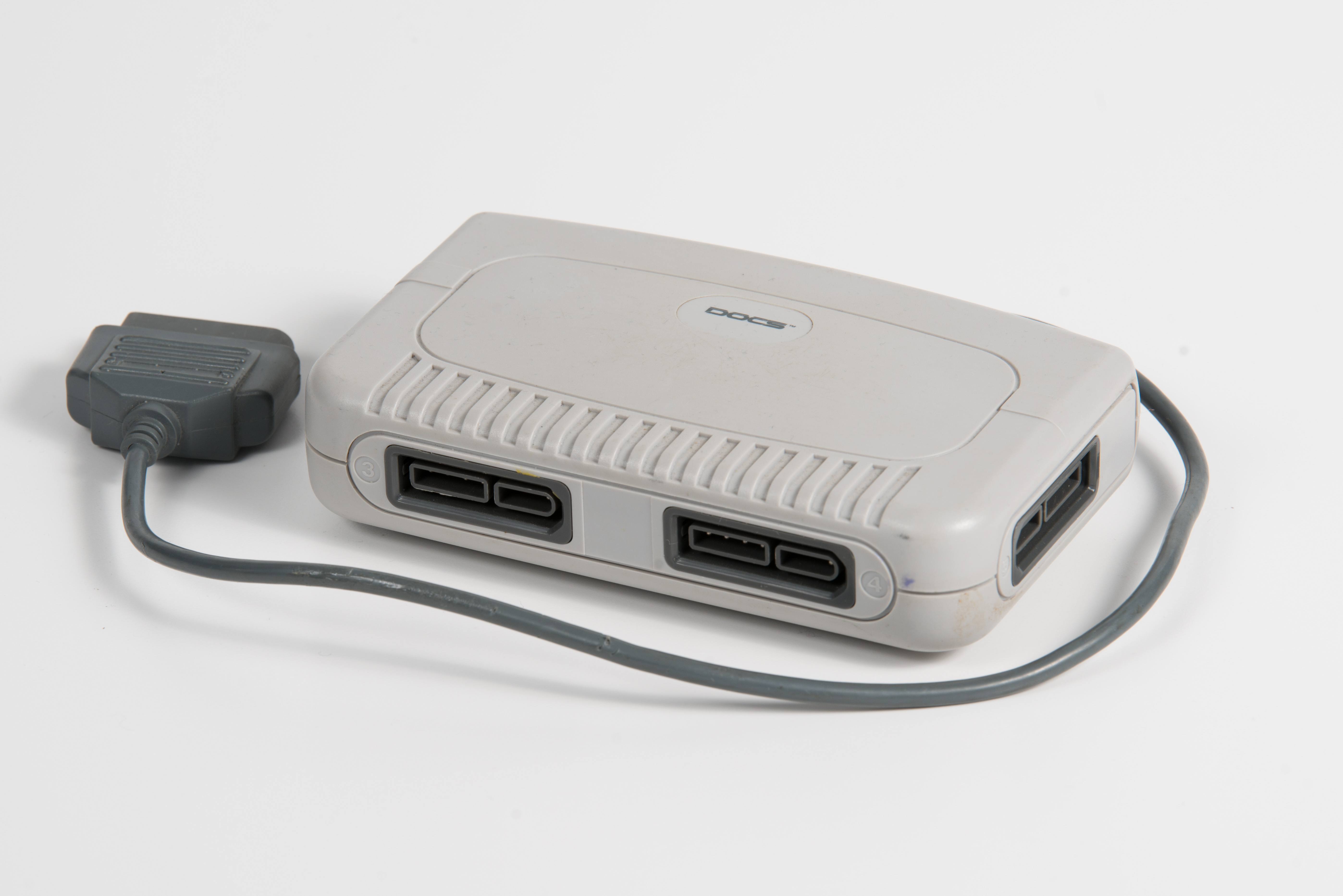 SNES-Zubehör: MultiTap